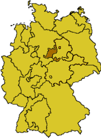 Evangelisch-Lutherische Landeskirche in Braunschweig